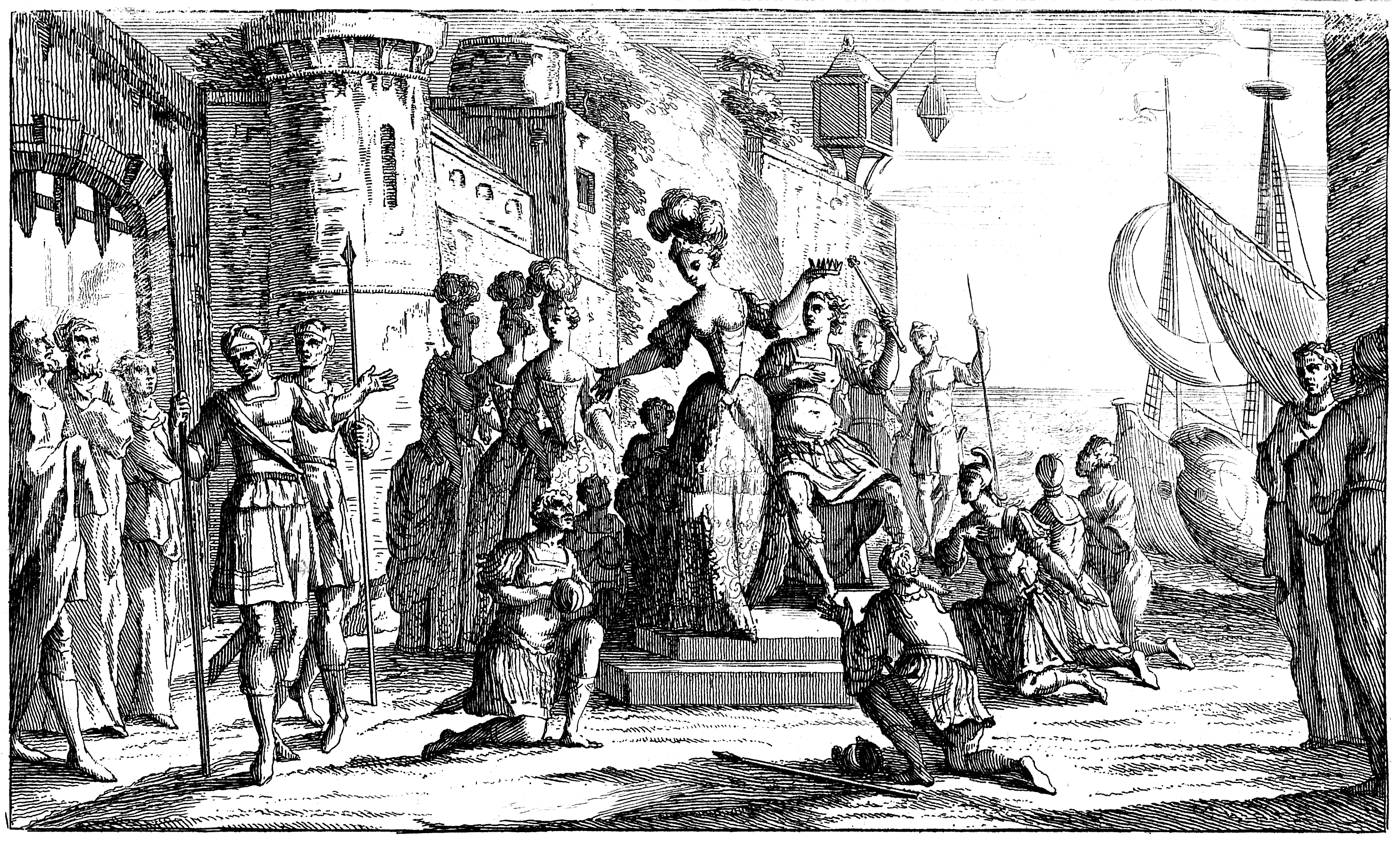 Jean-Baptiste Lully - Roland - Acte 3 - Un Port de Mer - Paris 1685